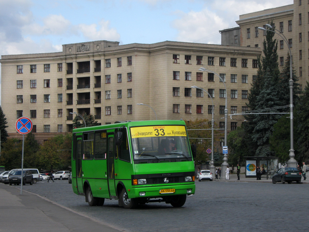 Автобус БАЗ-А079.14 в Харькове, на площади Свободы